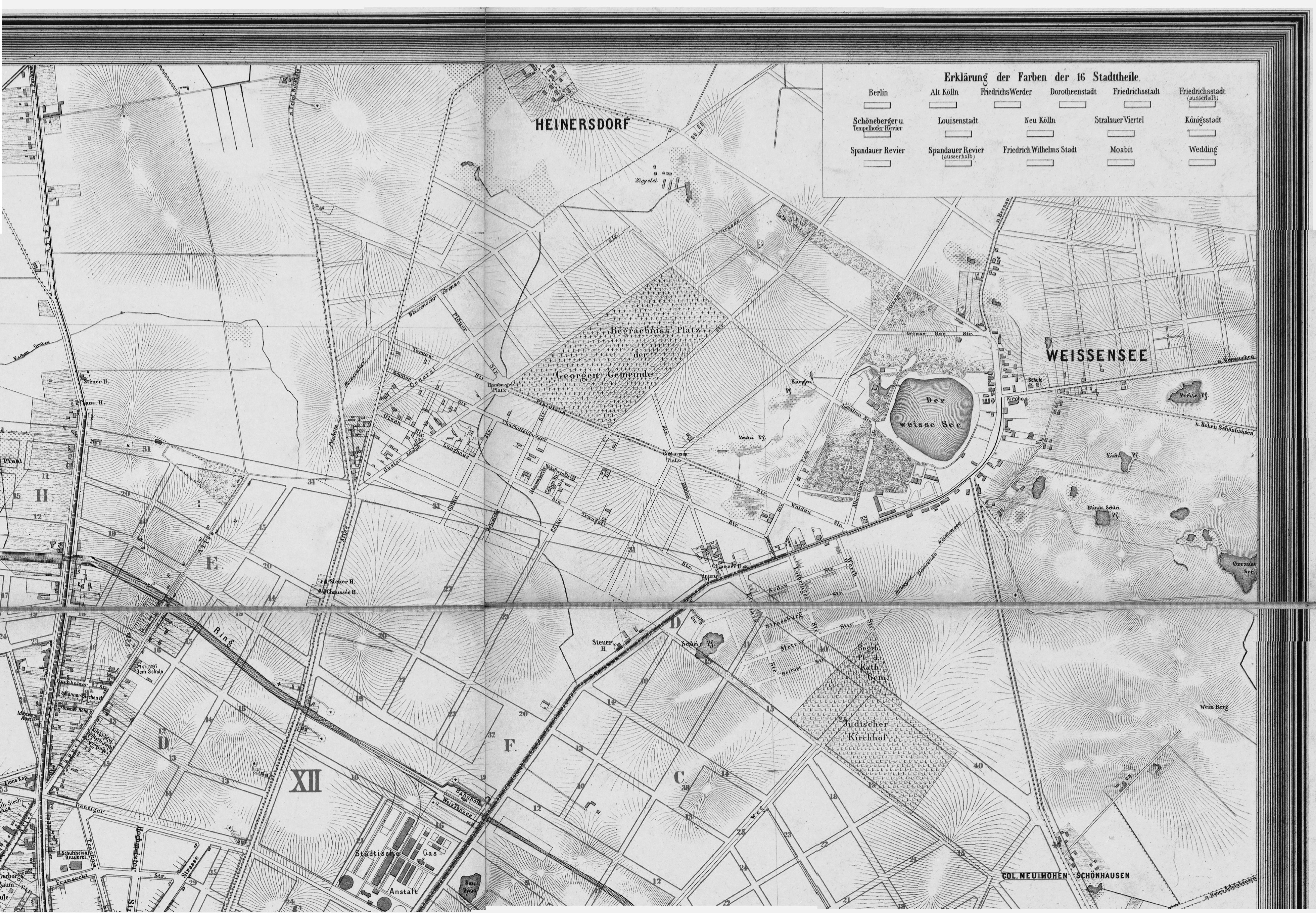 Die Straßensituation im Berliner Ortsteil Weißensee wie sie im Jahr 1882 war. Die Straßenzüge in Neu-Weißensee wurden durch Herauskopieren der rechten oberen Ecke (Nordost) aus dem Digitalisat des "Situationsplan von Berlin mit dem Weichbilde und Charlottenburg. Neu aufgenommen und gezeichnet von Sinbeck Major a.D., Berlin Verlag von Dietrich Reimer" leichter zugänglich gemacht.